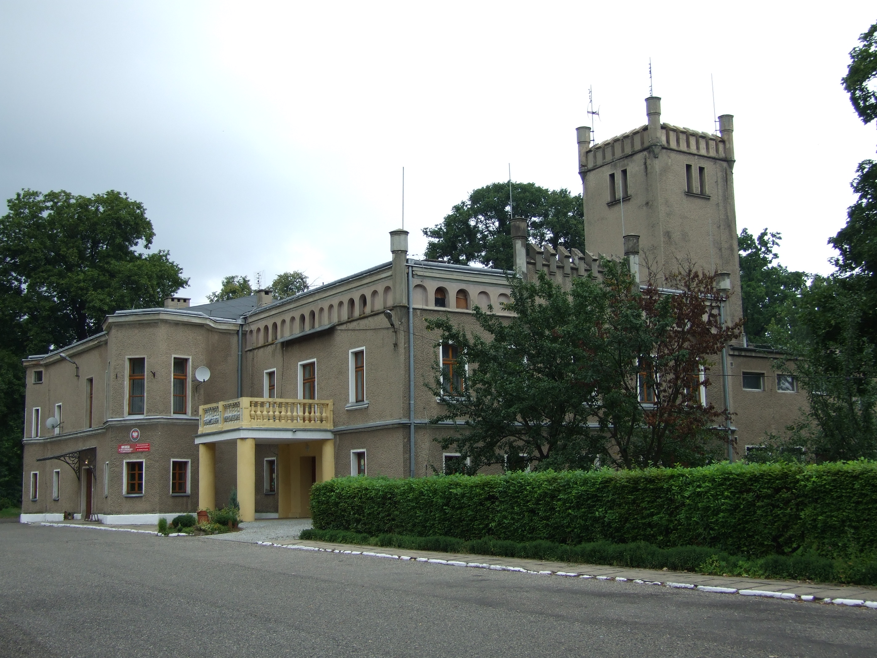 Państwowy Dom Dziecka w Sowczycach